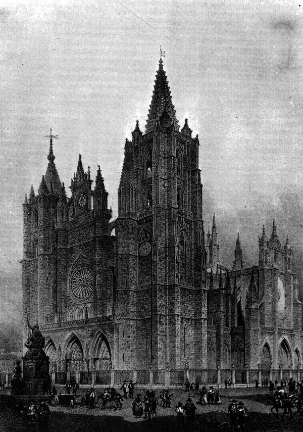 Dibujo catedral de León 1850